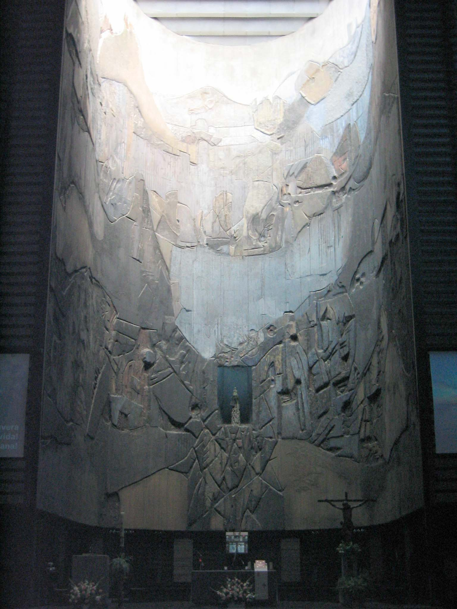 Irudia/Image: Arantzazu santutegia, abside, Oñati, Gipuzkoa